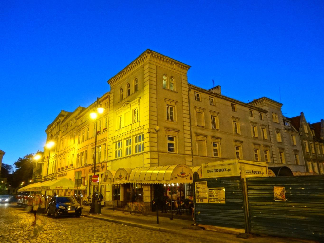 Stary Rynek w Bydgoszczy